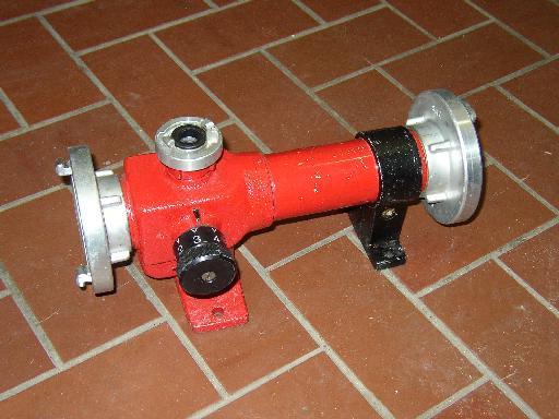 Feuerwehr - Zumischer